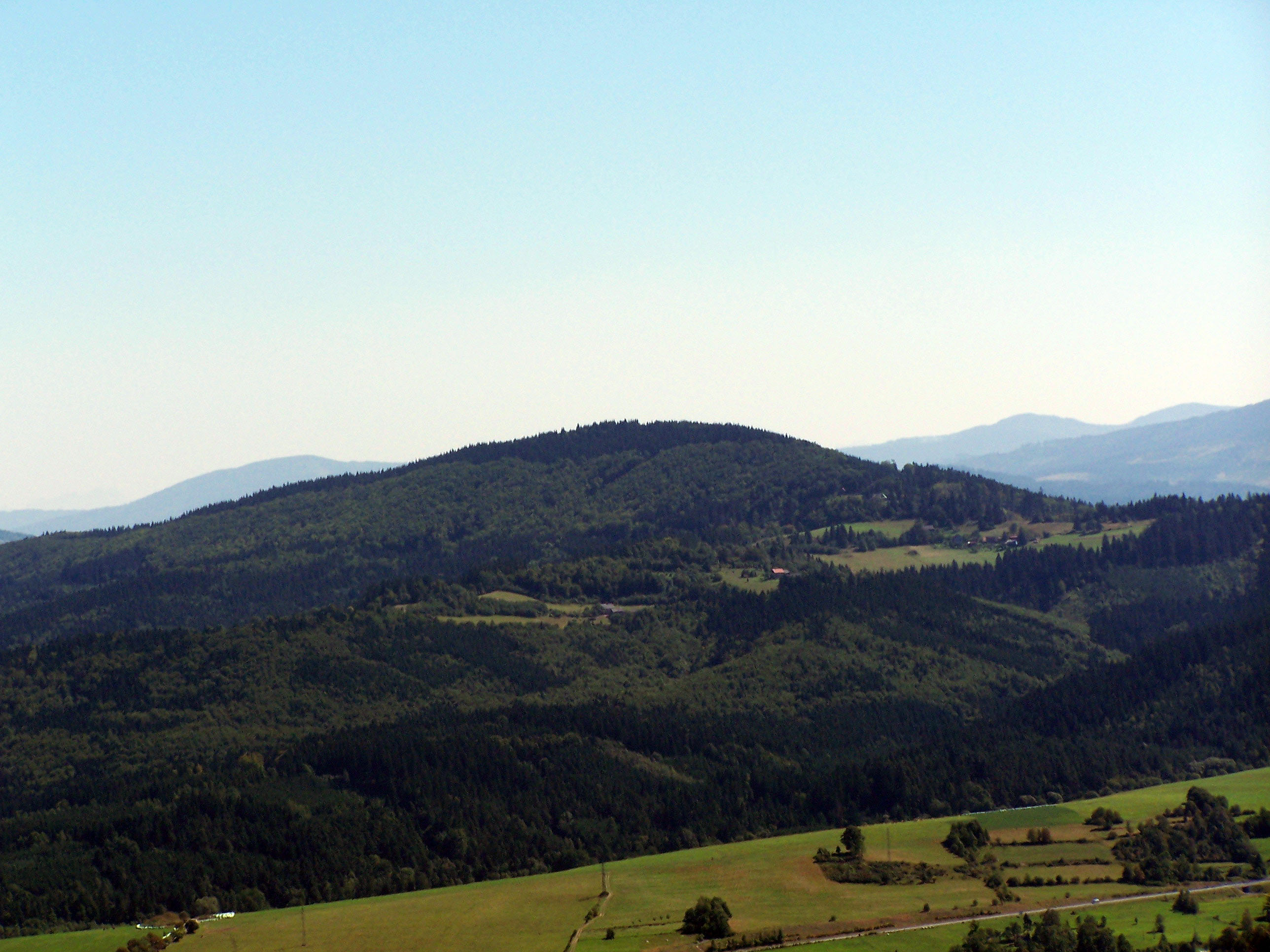 Gírová (Girowa) mountain, Czech Republic